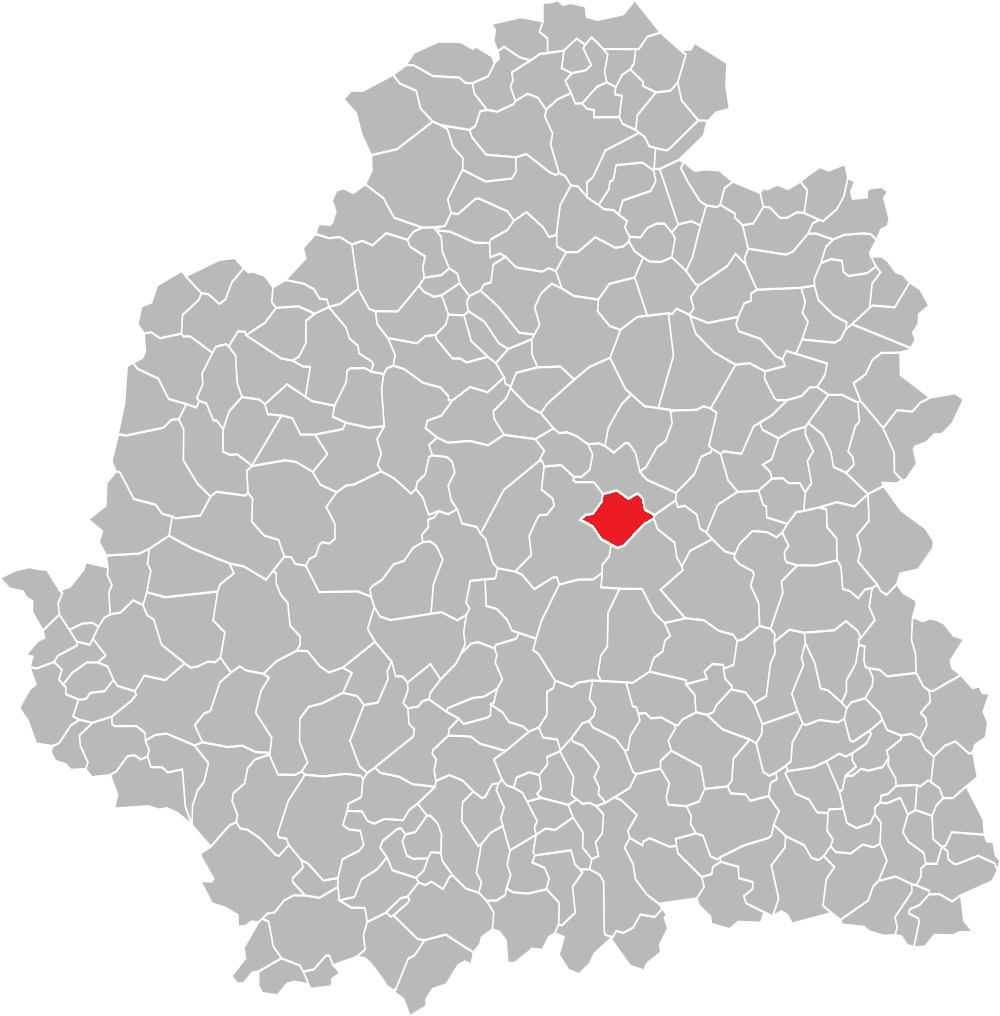 Carte des communes de l'Indre (36) : Les cantons de Châteauroux-Centre et de Châteauroux-Sud, de 1973 à 2015.